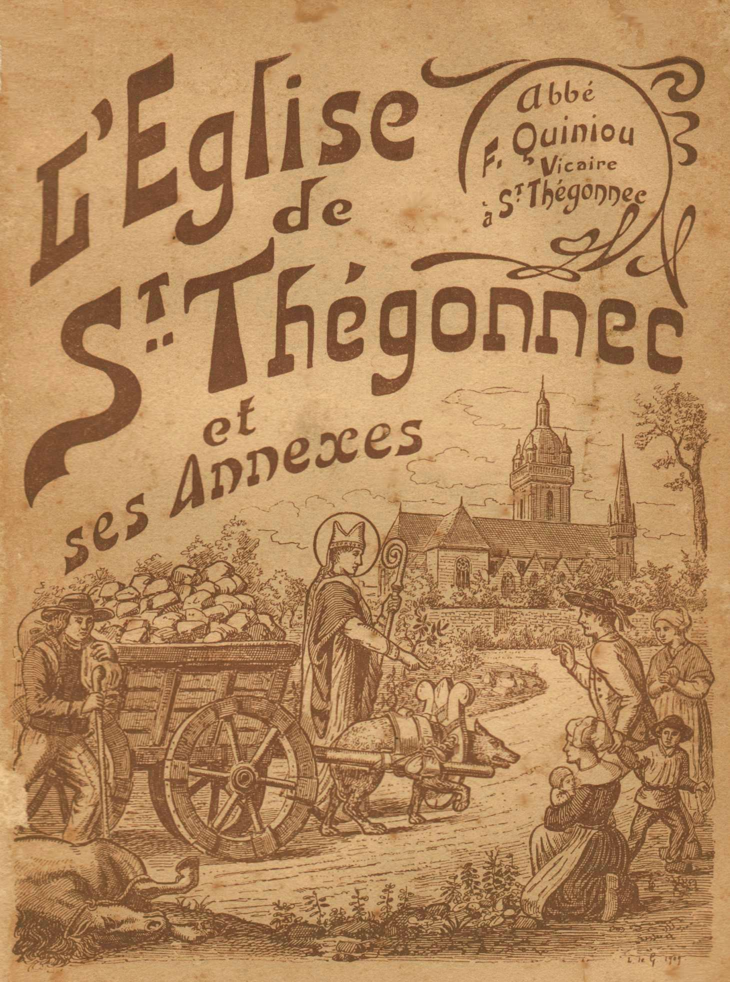 Couverture du livre : Saint-Thégonnec. L’Église et ses annexes de l'Abbé François Quiniou (1870 – 1931)